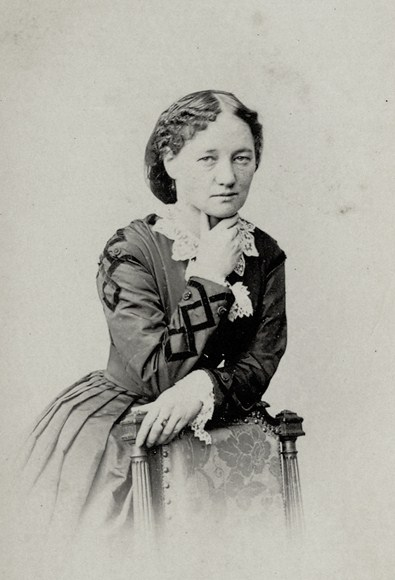 Анны Федоровна Аксакова, урожденная Тютчева